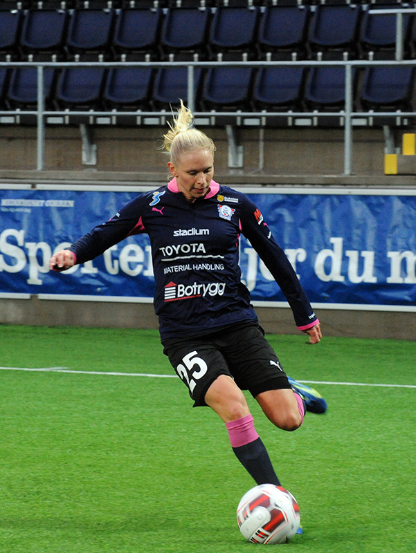 Jonna Andersson in November 2014